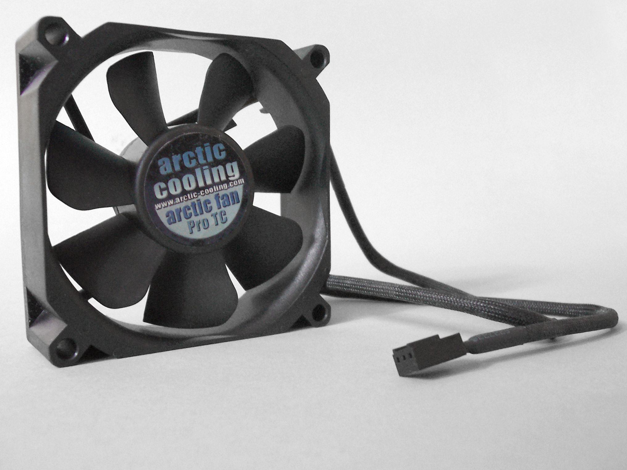 Gehäuselüfter mit Anschlusskabel, 80*80*25 mm, 1000 -- 2500 RPM, Arctic cooling fan Pro TC